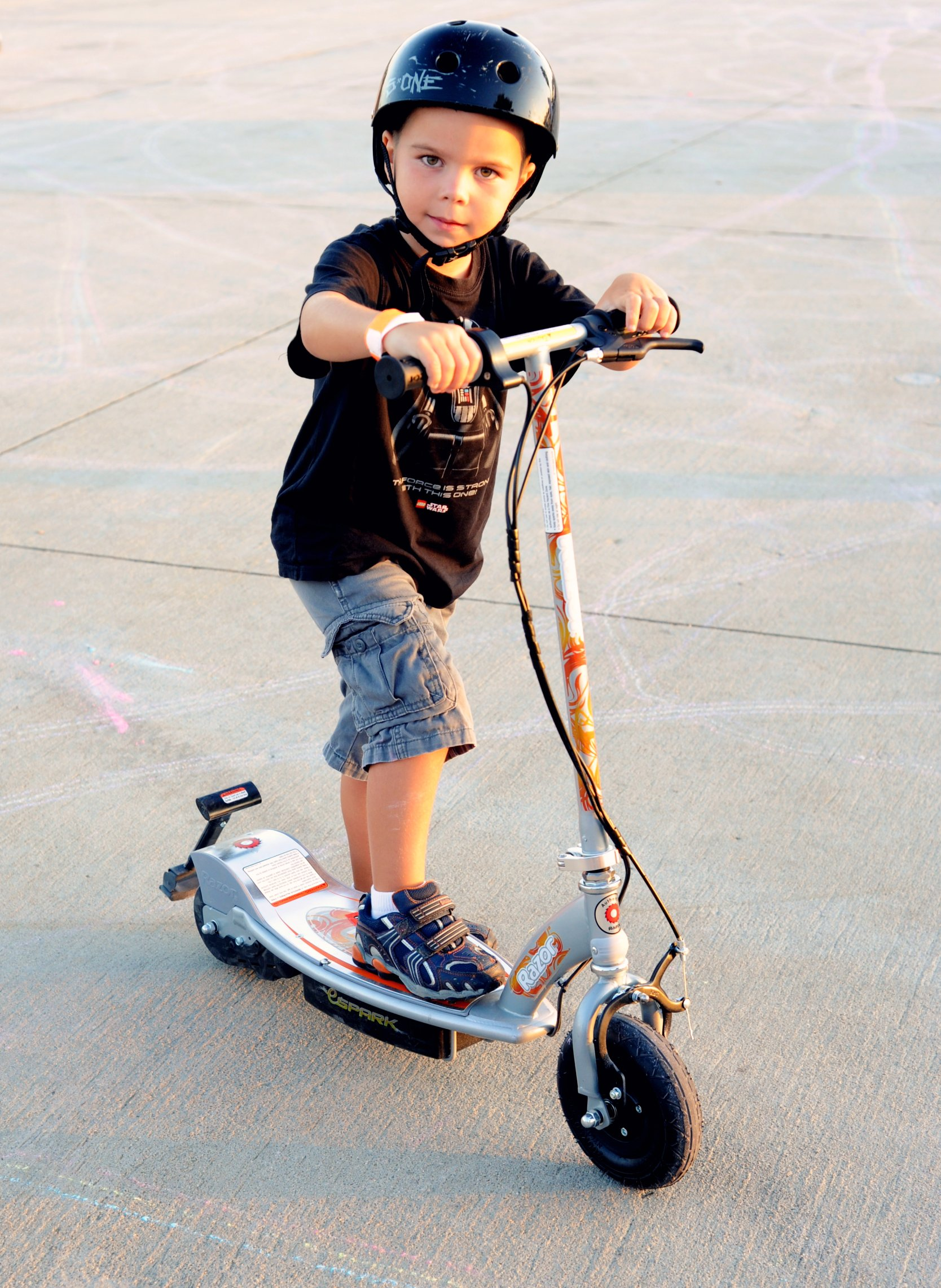 Razor eSpark